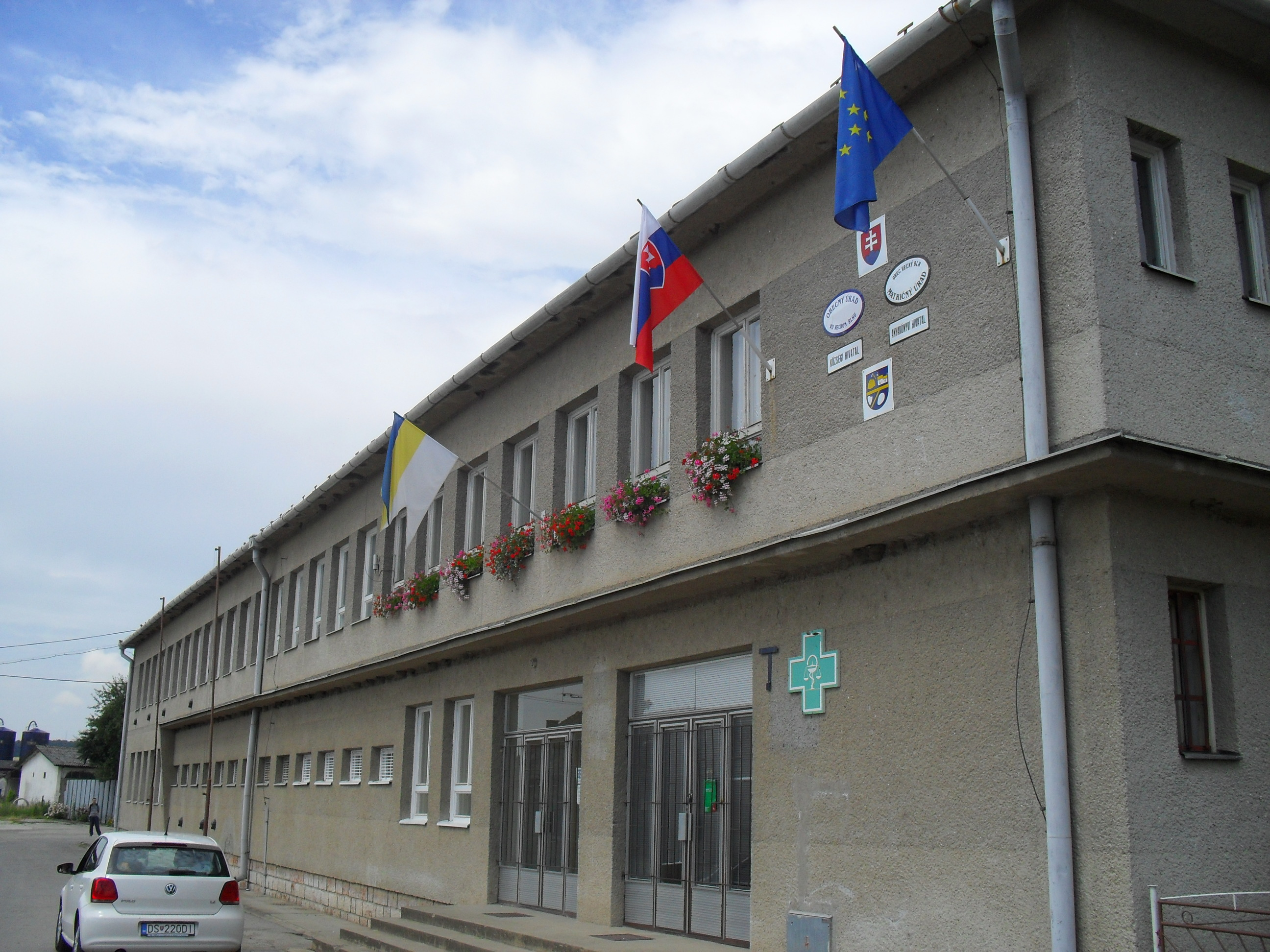 Nagybalog - községi hivatal